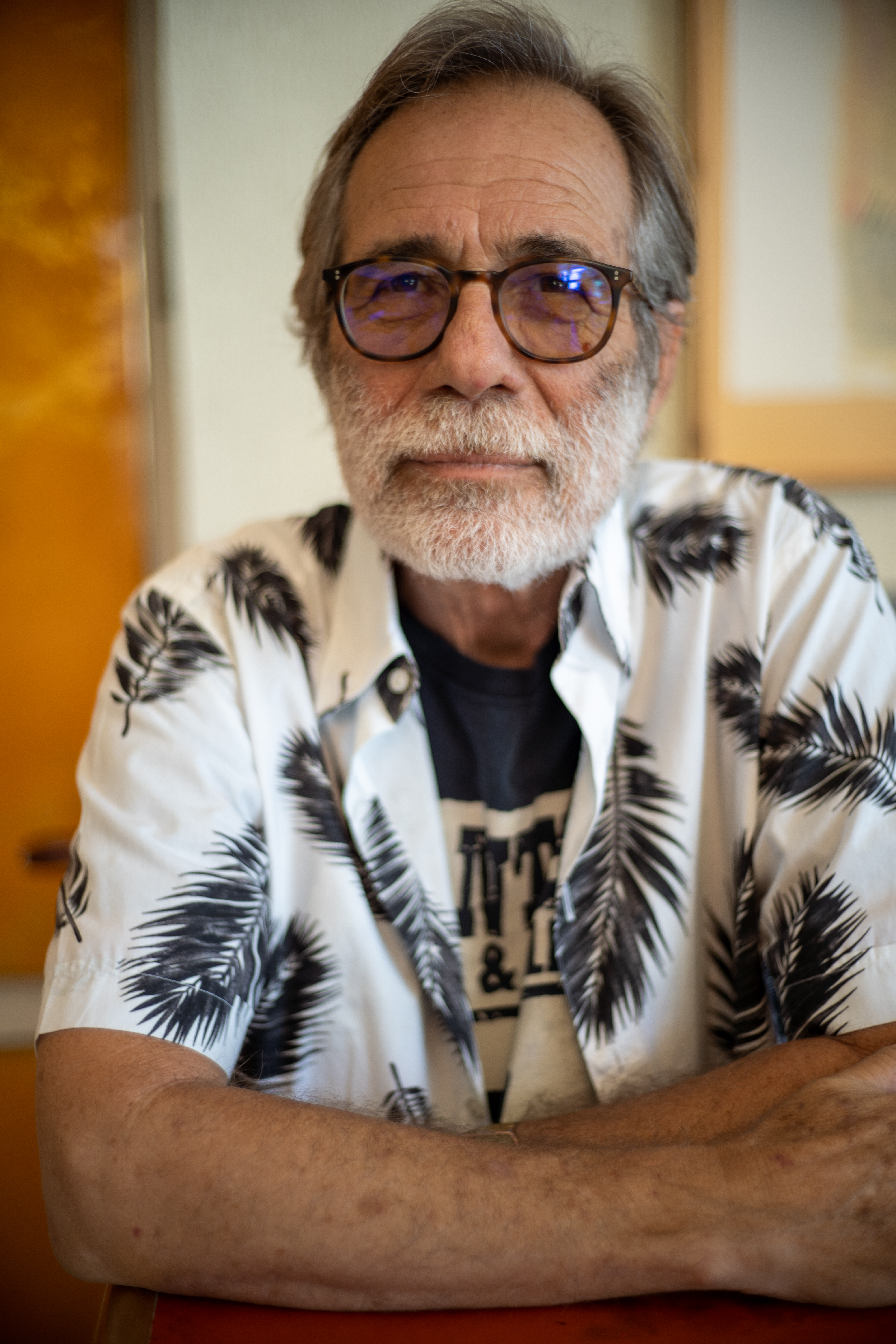 יקי דוניץ - יזם, ממציא, חוקר בינה מלאכותית ואיש נדל"ן ישראלי